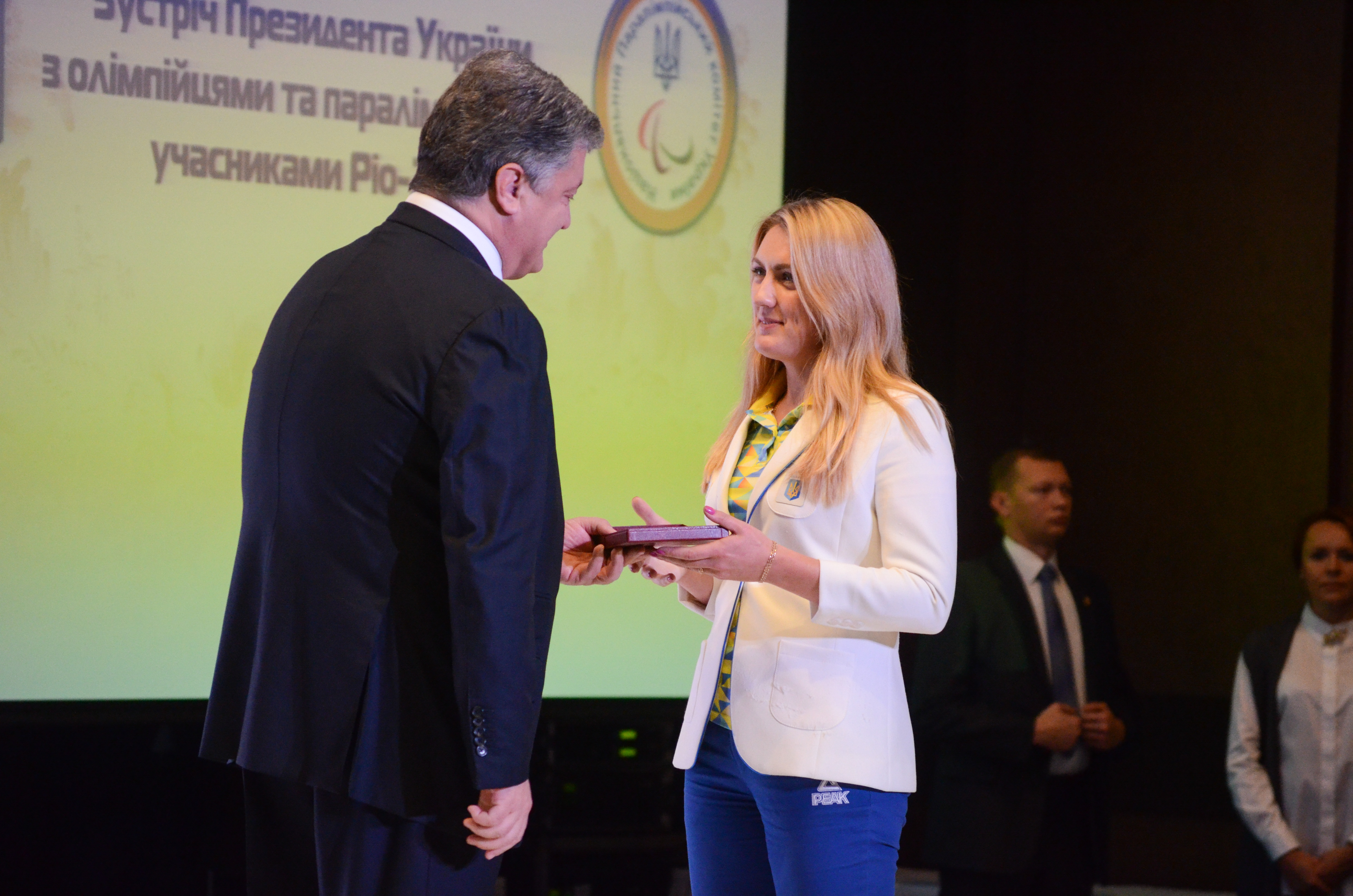 Зустріч Президента України з олімпійцями та паралімпійцями — учасниками Ріо-2016.